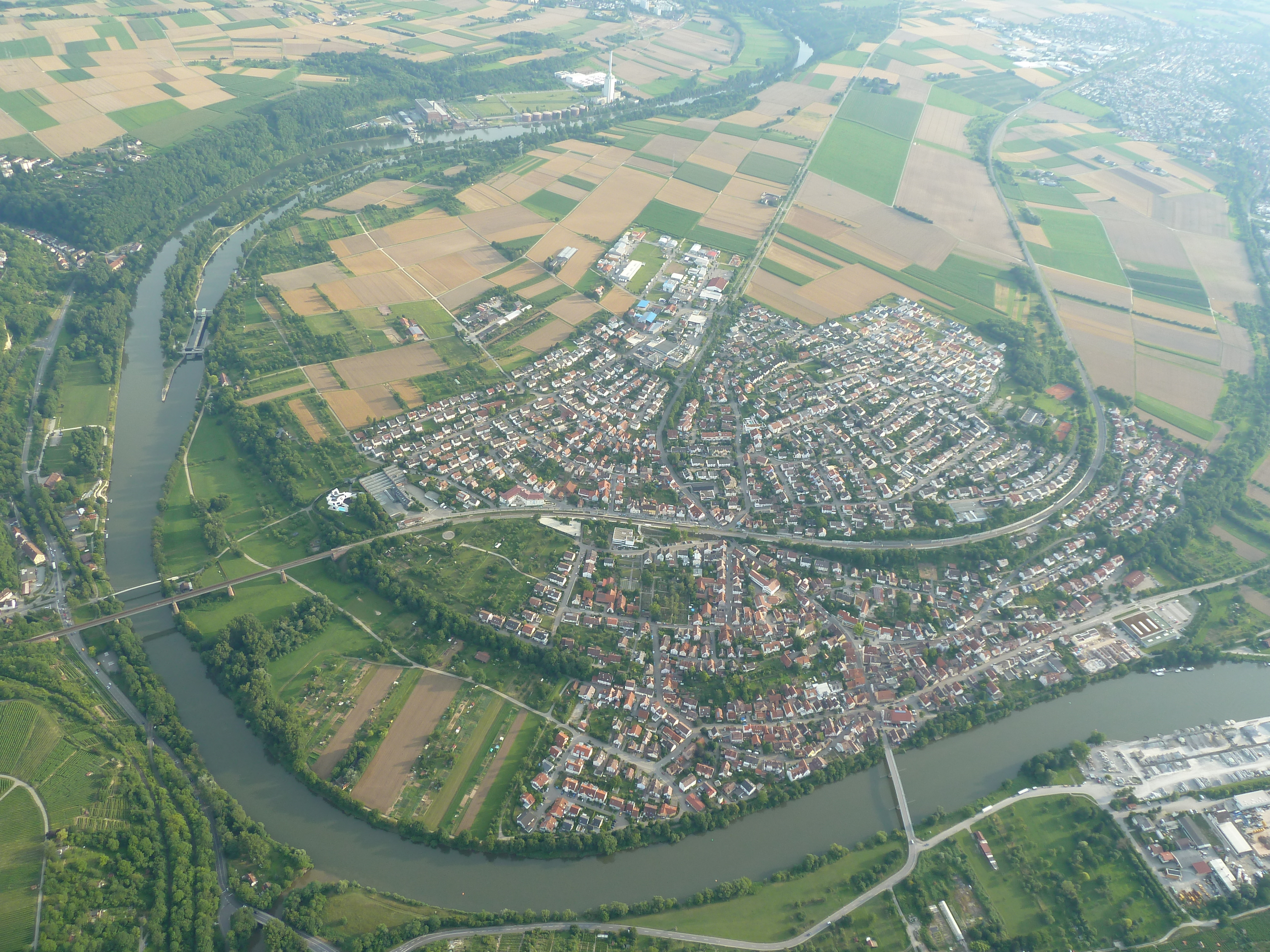 Benningen am Neckar aus der Luft